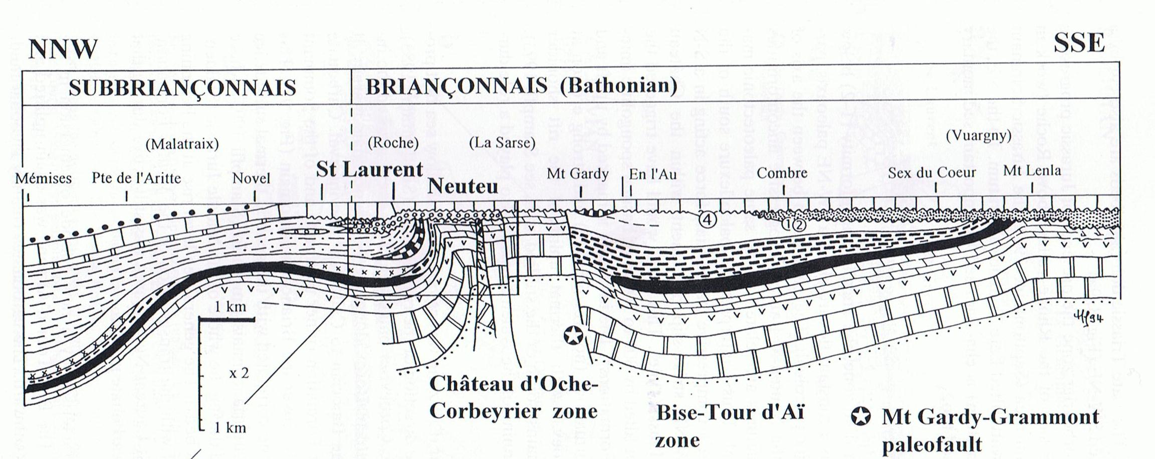 Profil palinspastique des Préalpes médianes montrant la complexité de la paléotectonique jurassique, sous les couches du Crétacé inférieur prisent comme référence horizontale. Discussion chez Septfontaine (1995): Eclogae geol.Helv., 88/3, 553-576. Ænglisc: Palinspastic profile through the Préalpes médianes nappe, showing the complexity of jurassic paleotectonics proved by numerous angular unconformities. Discussion in the paper of Septfontaine(1995): Eclogae geol. Helv., 88/3, 553-576